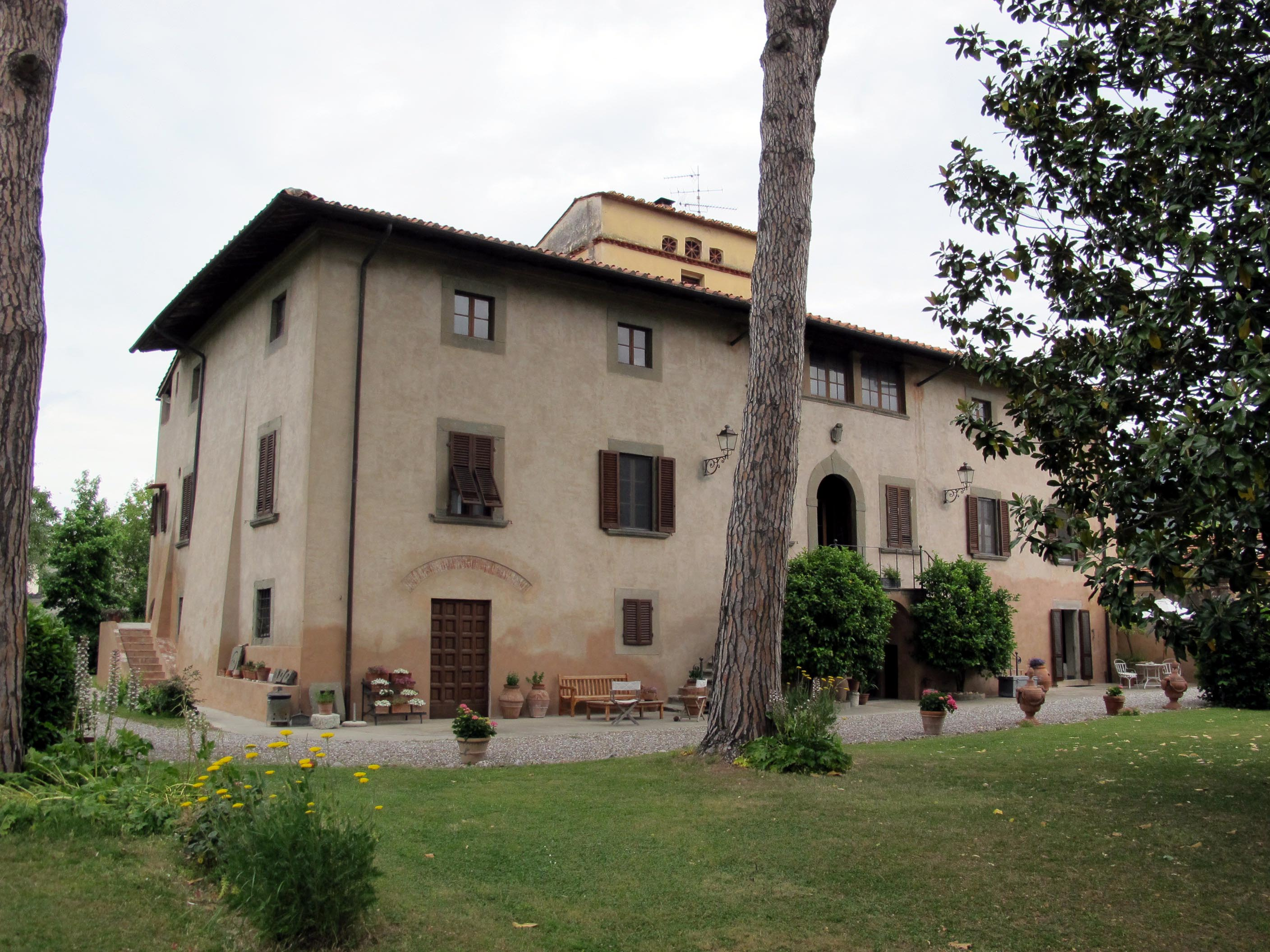 Villa gentili di avane, vecchiano